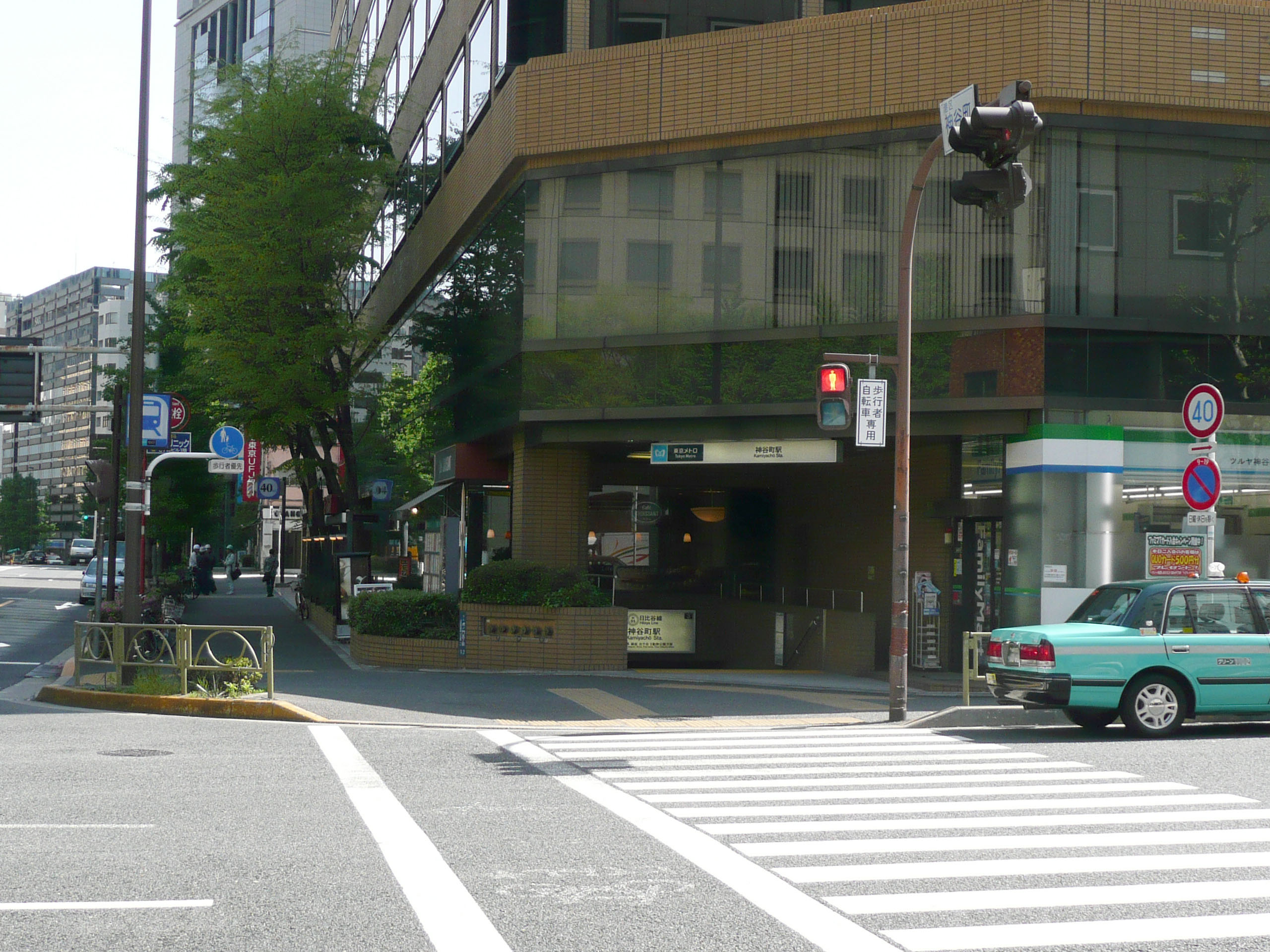 神谷町駅3番出入口